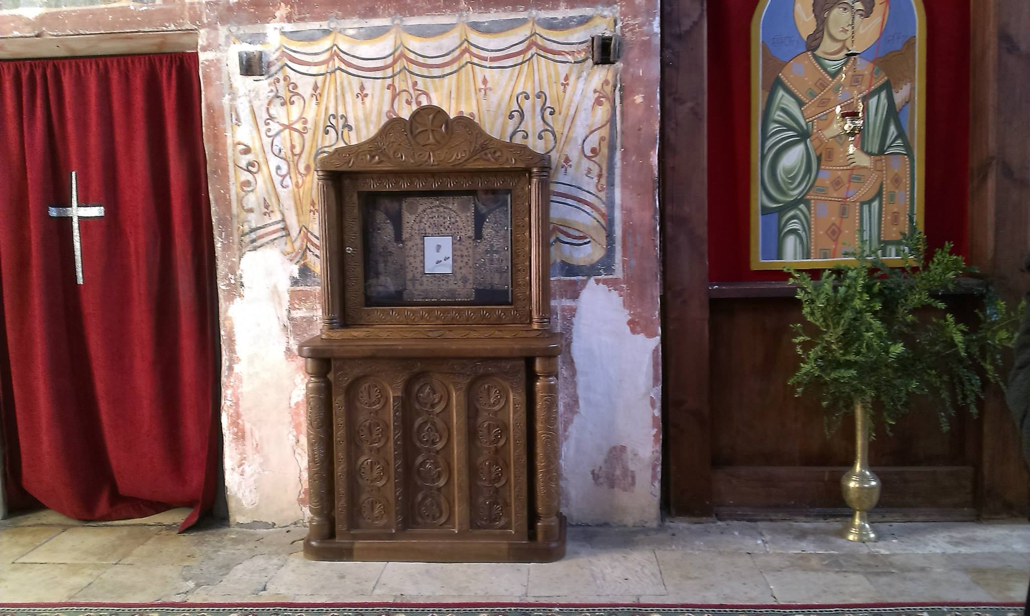 2014 წლის 11 იანვარს ჭირაქაძეთა საგვარეულოს მფარველი ხახულის ხატის ასლი დაბრძანდა გელათში საკურთხევლის გვერდით, იმ ისტორიულ ადგილზე, სადაც საუკუნეების მანძილზე დაბრძანებული იყო ხახულის ღთისმშობლის ხატი (დედანი).